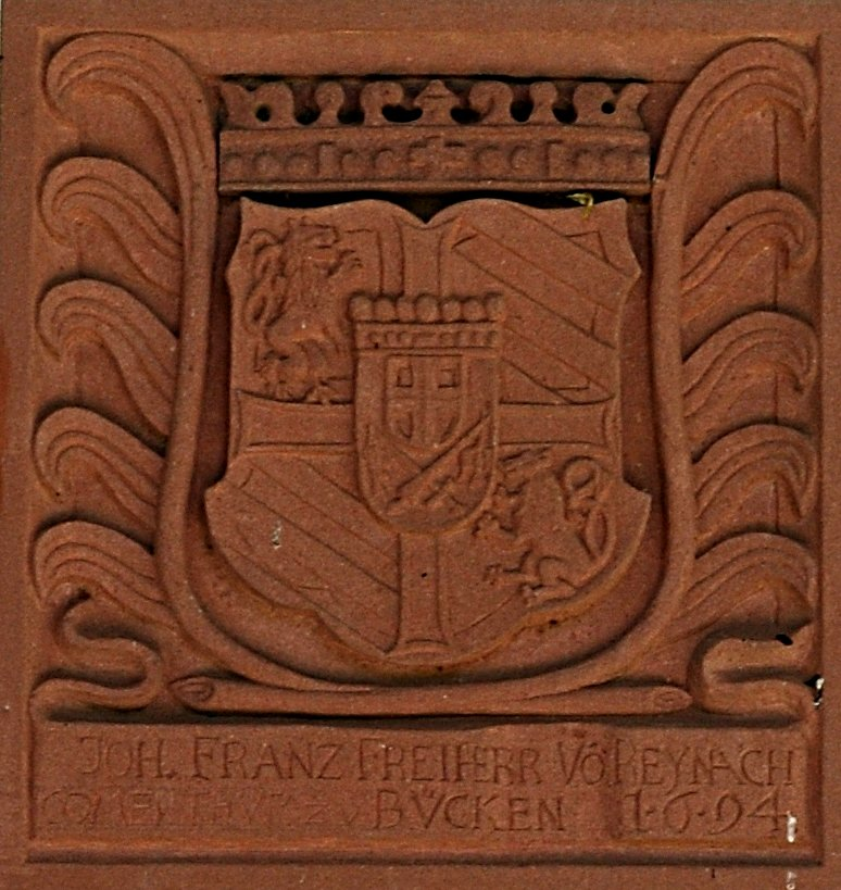 Schloss Beuggen: Wappen des Komturs Johann Franz Freiherr von Reinach am Teehaus